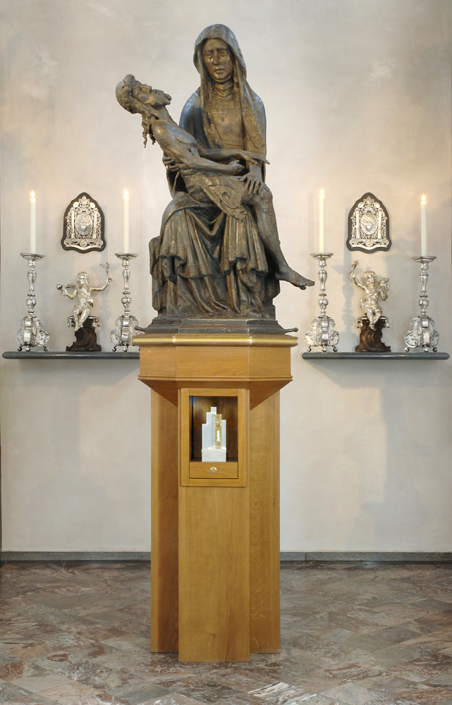 Das Reliquiar von Clemens Graf von Galen mit Sockel und dazugehöriger Skulptur.